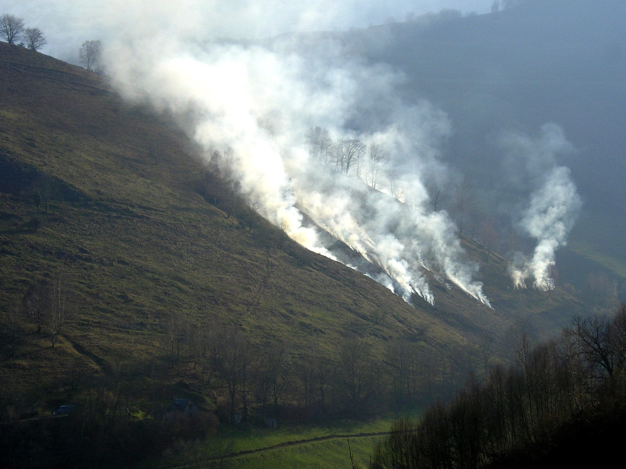 Ecobuage dans les Pyrénées, Hautes Pyrénées